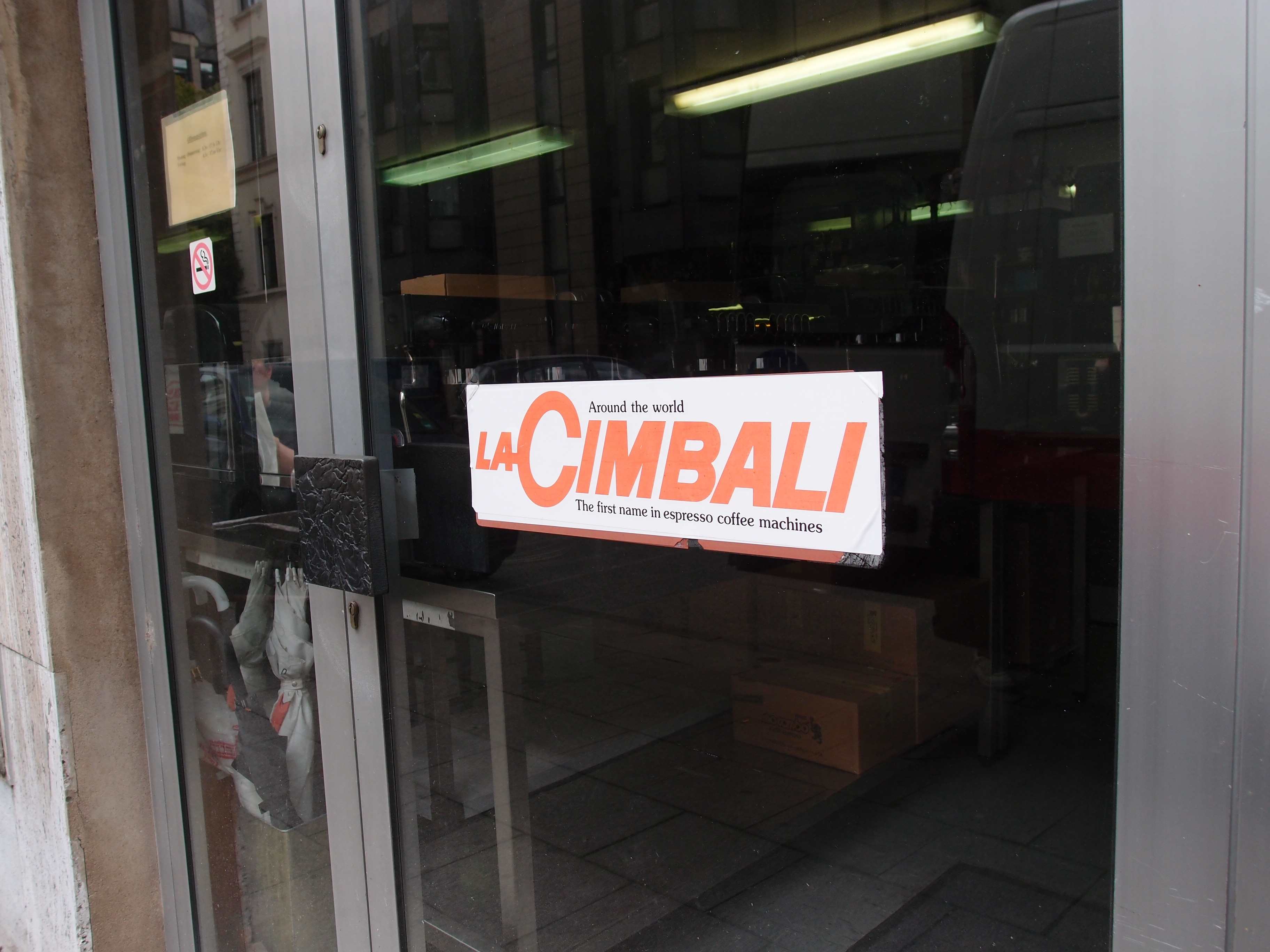 "La Cimbali" Filialie in der Kölner Innenstadt Datum: 26.08.2011 Urheber: M. Pfeiffer alias Benutzer:Gordito1869 Quelle: privates Fotoarchiv des Urhebers